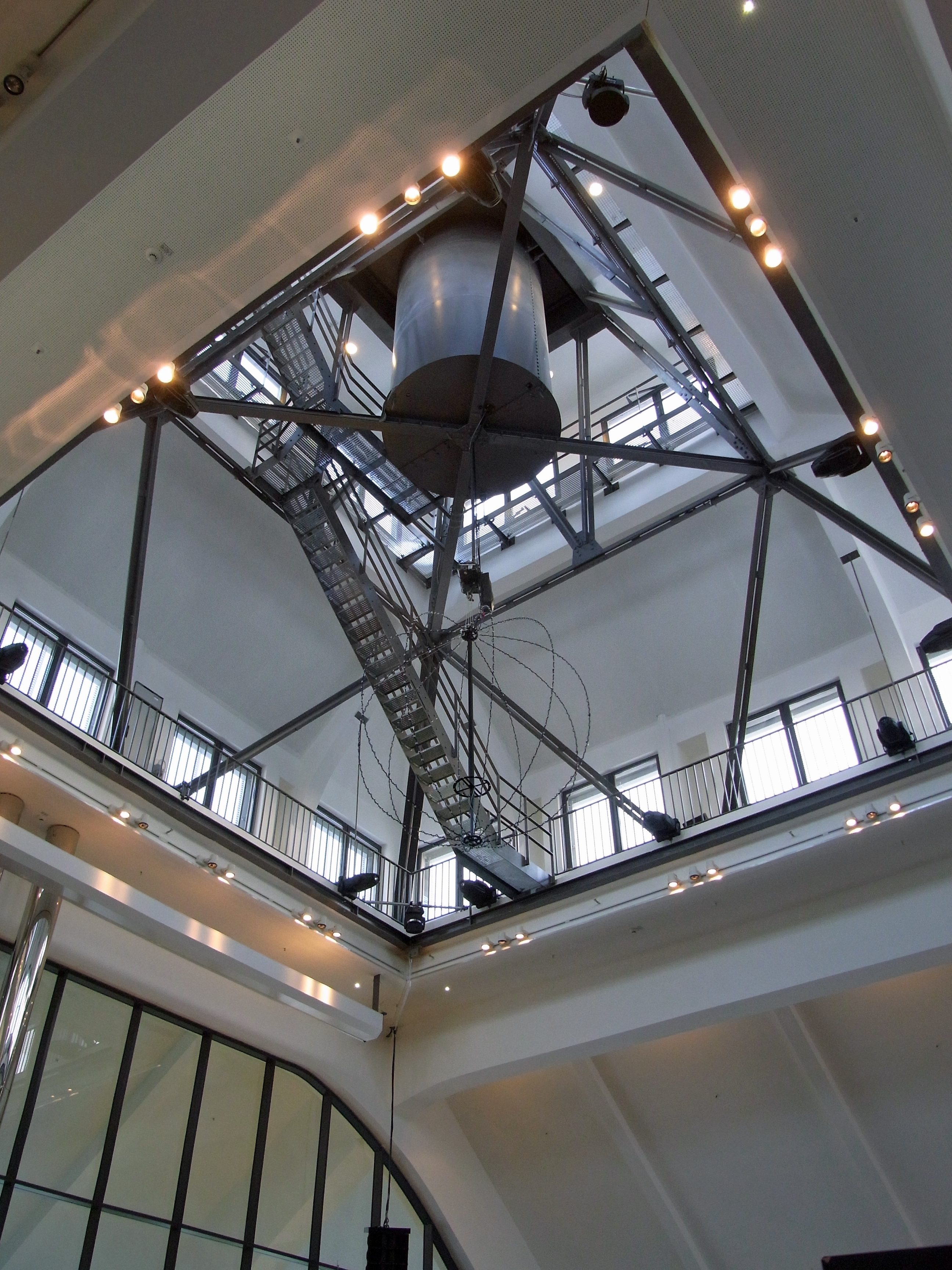 RUHR.2010 – Kulturhauptstadt Europas Ruhr.2010 - Das Finale Abschlussveranstaltung am 18. Dezember 2010 am Dortmunder U Kathedrale